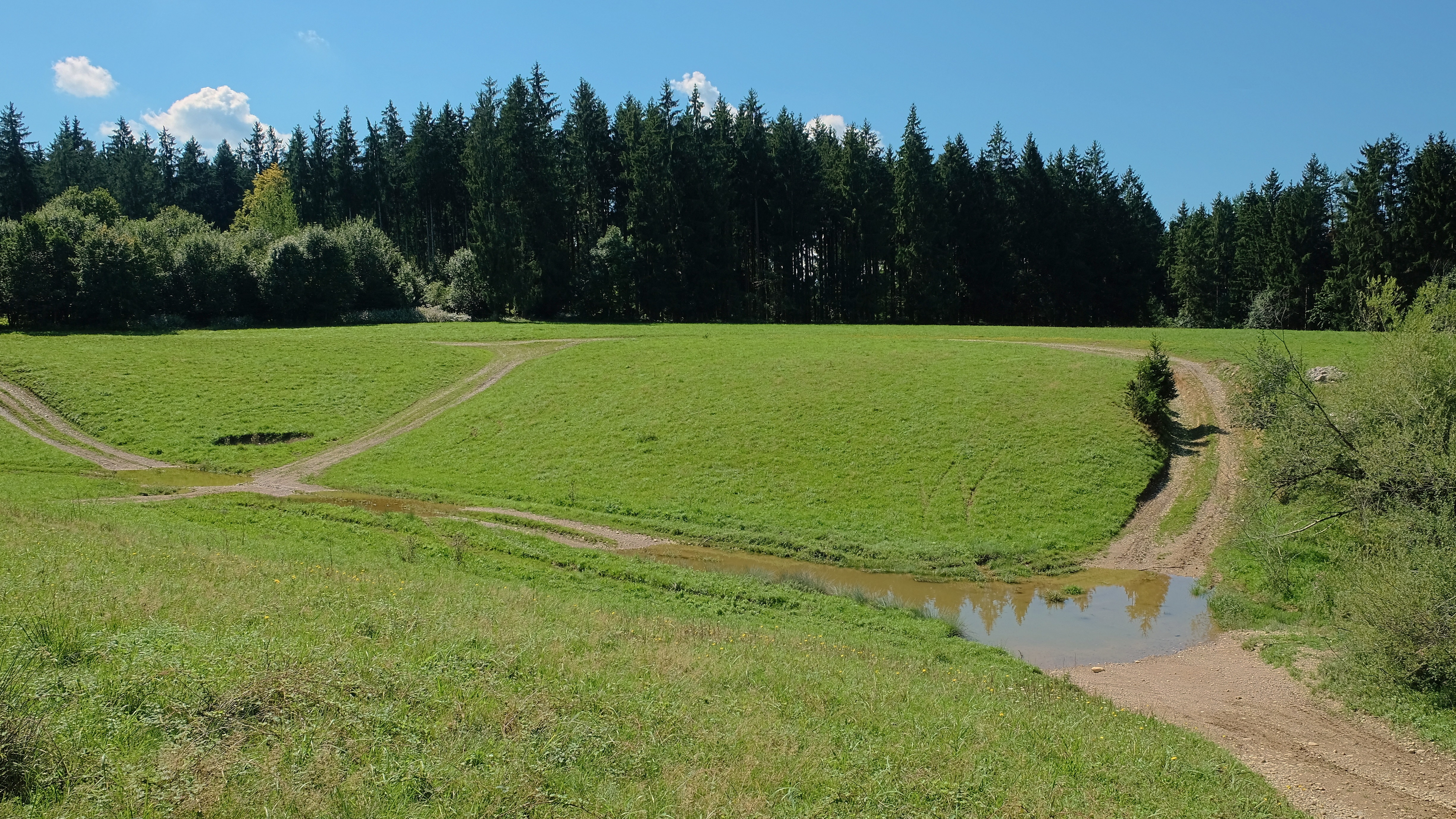 Die Panzerschwemme auf dem Standortübungsplatz Traunstein ist ein Biotop für seltene Amphibien. Der Standortübungsplatz Traunstein ist als FFH-Gebiet (8041-371) ausgewiesen.